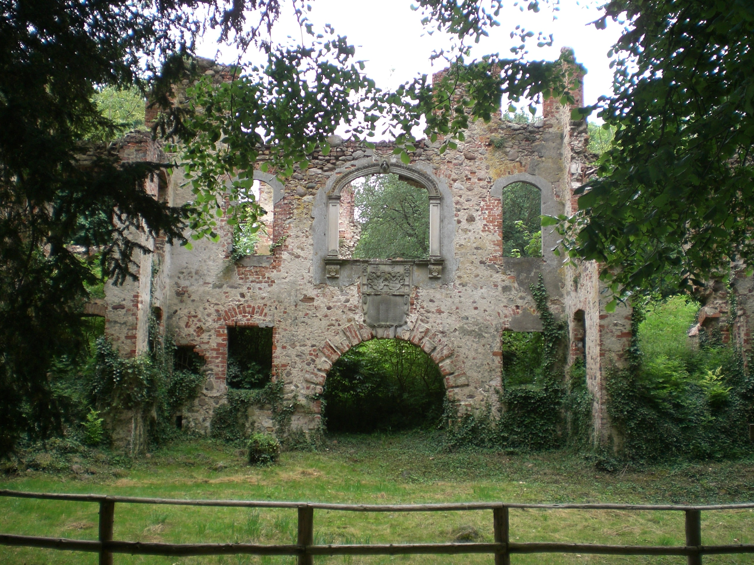 Ruine des Neuen Schlosses von Tylsen, das eines der prächtigsten Schlösser der Altmark gewesen war